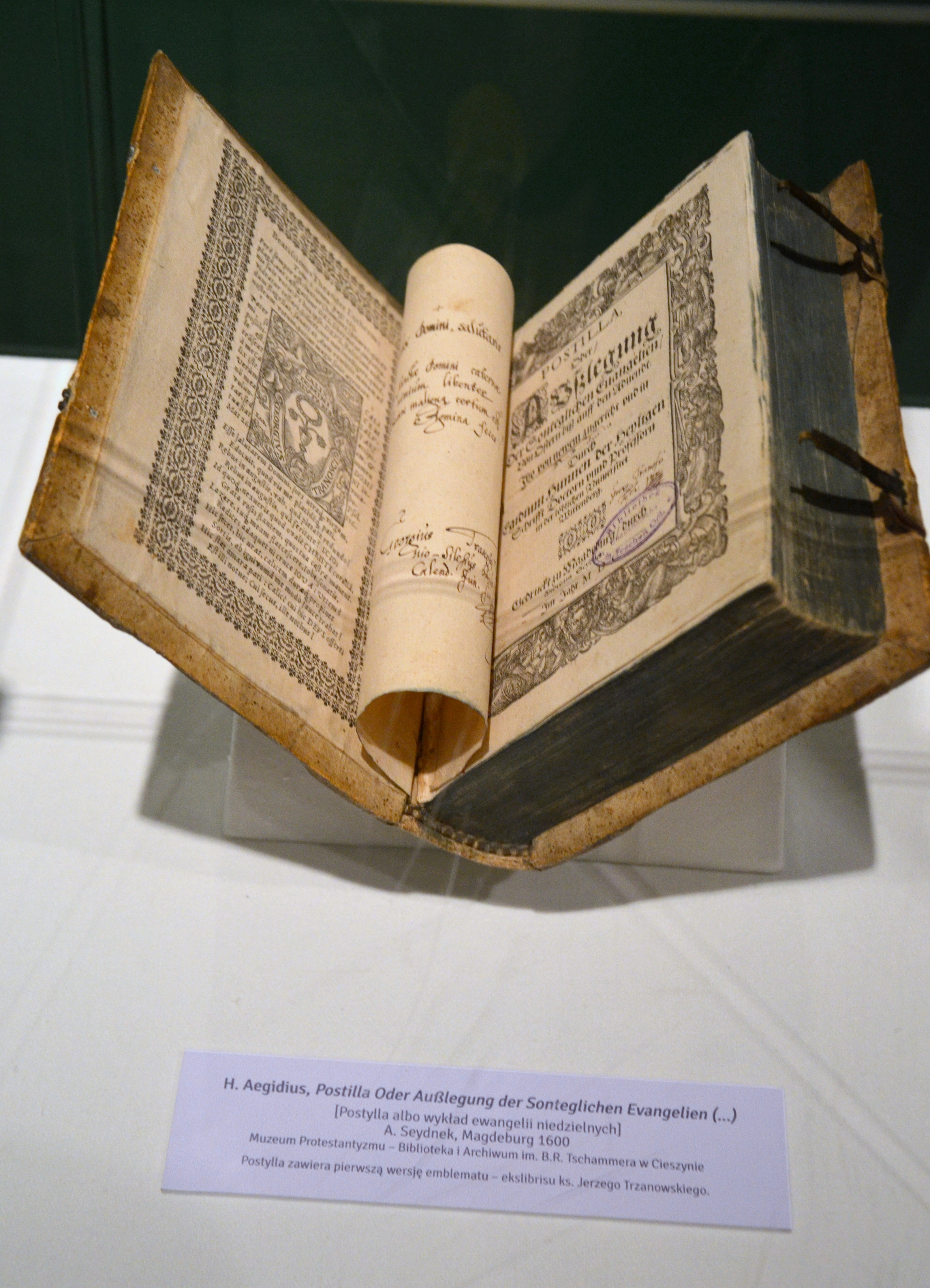 Das Erbe der Reformation im Ostmitteleuropa, Teschener Schlesien